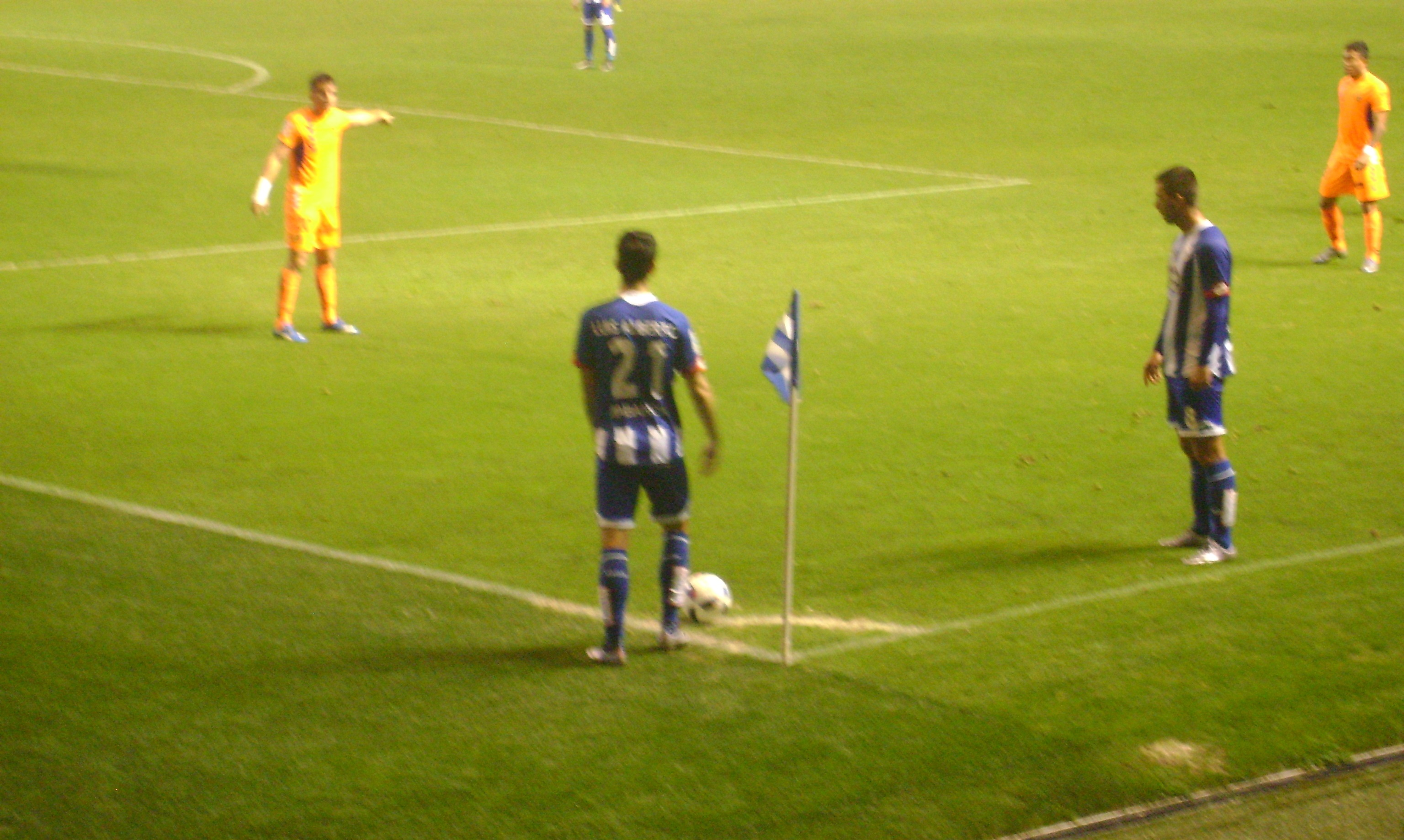 LuisAlberto y Medunjanin